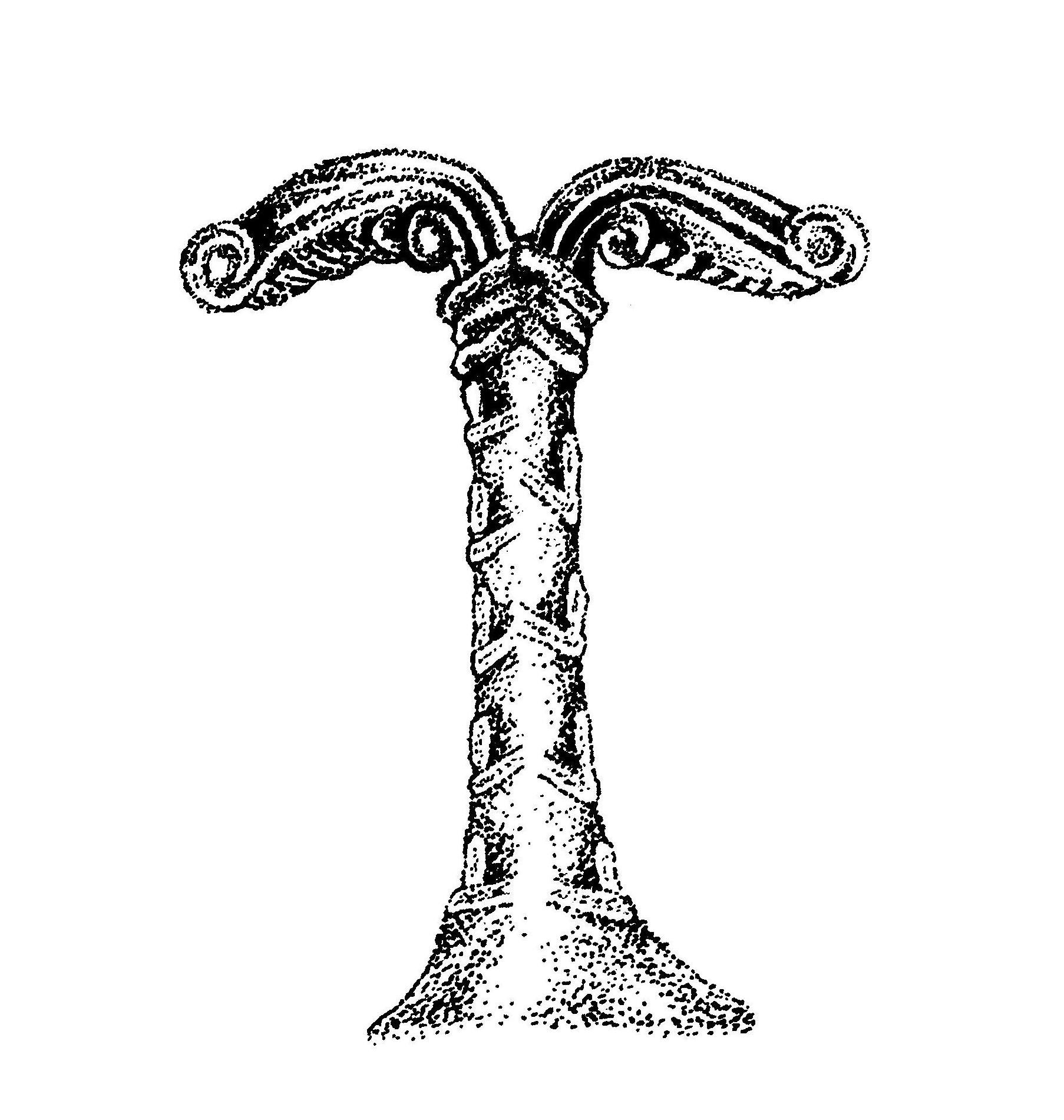 Die aufgerichtete Irminsul gezeichnet nach der Beschreibung alter Quellen und angelehnt an die Darstellung eines geknickten Baumes im Kreuzabnahmerelief an den Externsteinen.